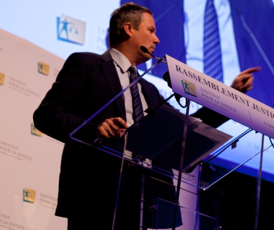 Discours de Nicolas Dupont-Aignan au Pacte pour la Justice en 2012